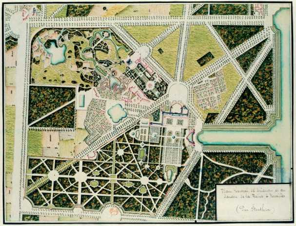 Plan Général de Trianon et du Jardin de la Reine à Versailles, dessin de Berthier, Paul (1822-1912)